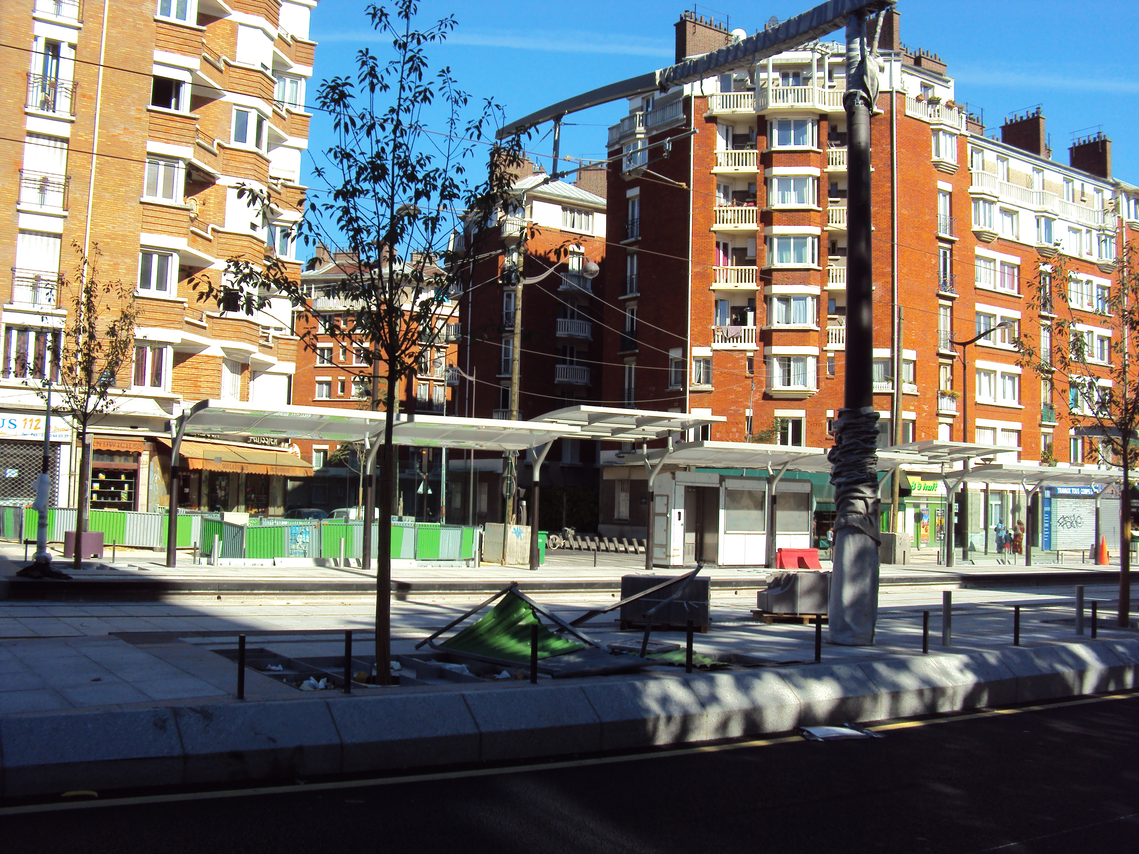 Travaux du tramway T3 Station mairie de Miribel